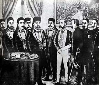 La signature du traité du Bardo Reproduction d'un dessin montrant la signature du traité du Bardo, avec de gauche à droite Mohamed Larbi Zarrouk, Mohammed Aziz Bouattour, Mustapha Ben Ismaïl, Mohammed Khaznadar, Sadok Bey, le général Élias Mussali, Théodore Roustan, le général Bréart, le général Pierre Léon Maurand et l'interprète Amard Tirage sur papier aluminé, 67 x 76 cm Tunis, Institut national du patrimoine, collection Qsar es-Saïd, inv. 46-07-28-49